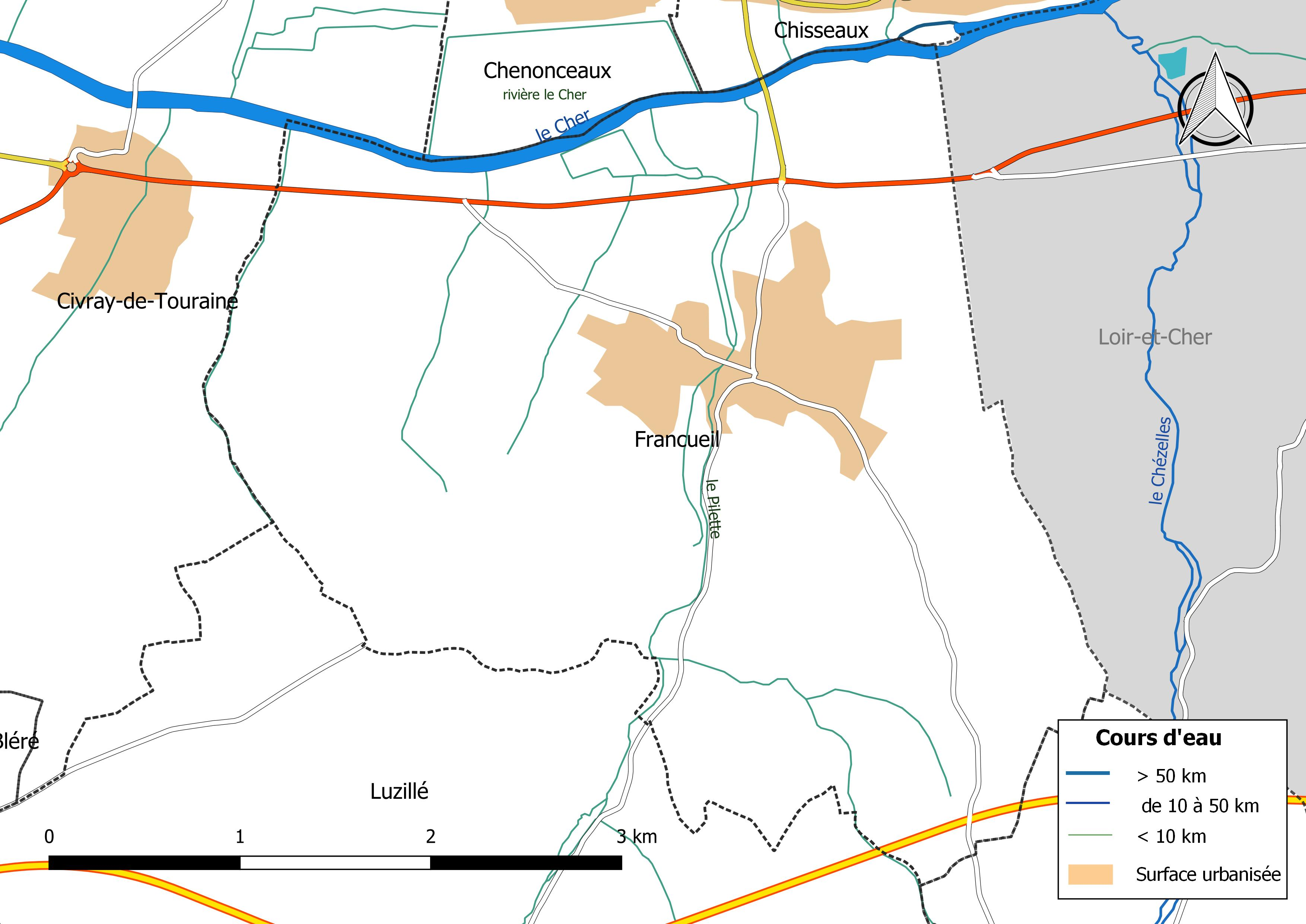 Carte du réseau hydrographique de la commune de Francueil (France).